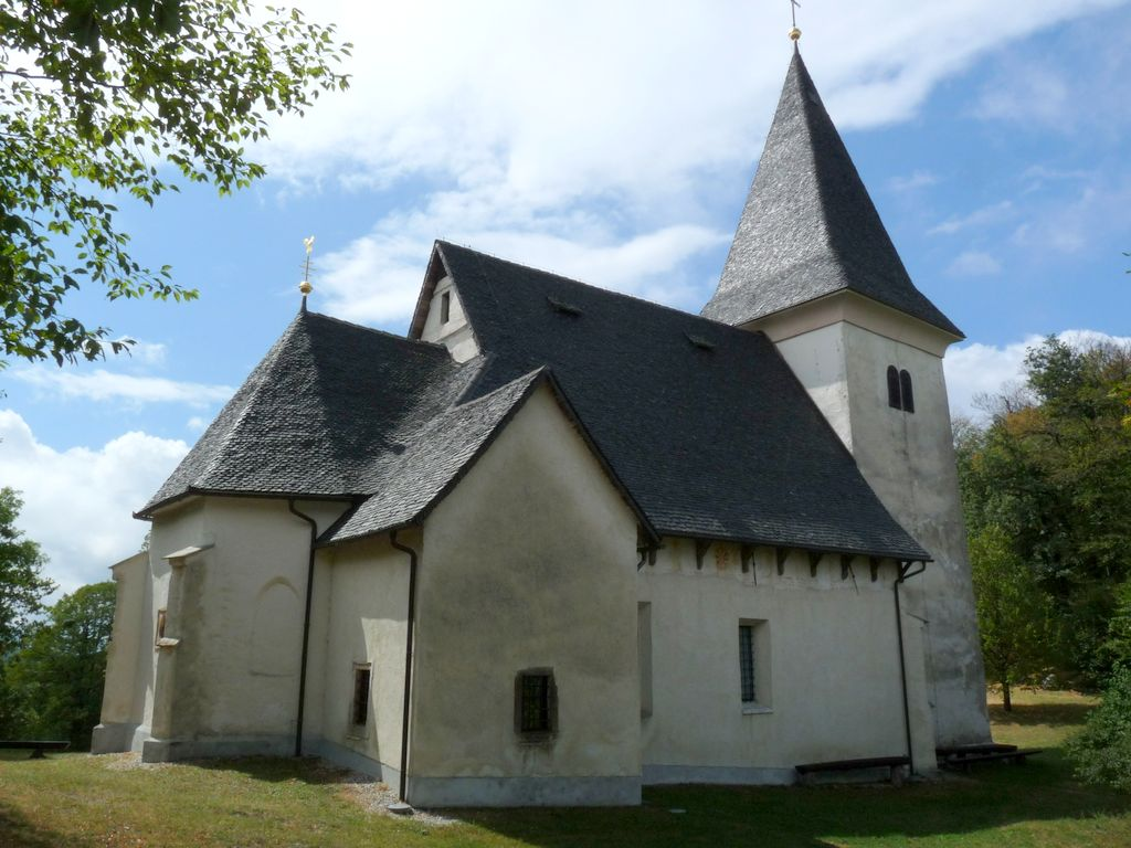 Sv. Marija na Ljubični gori